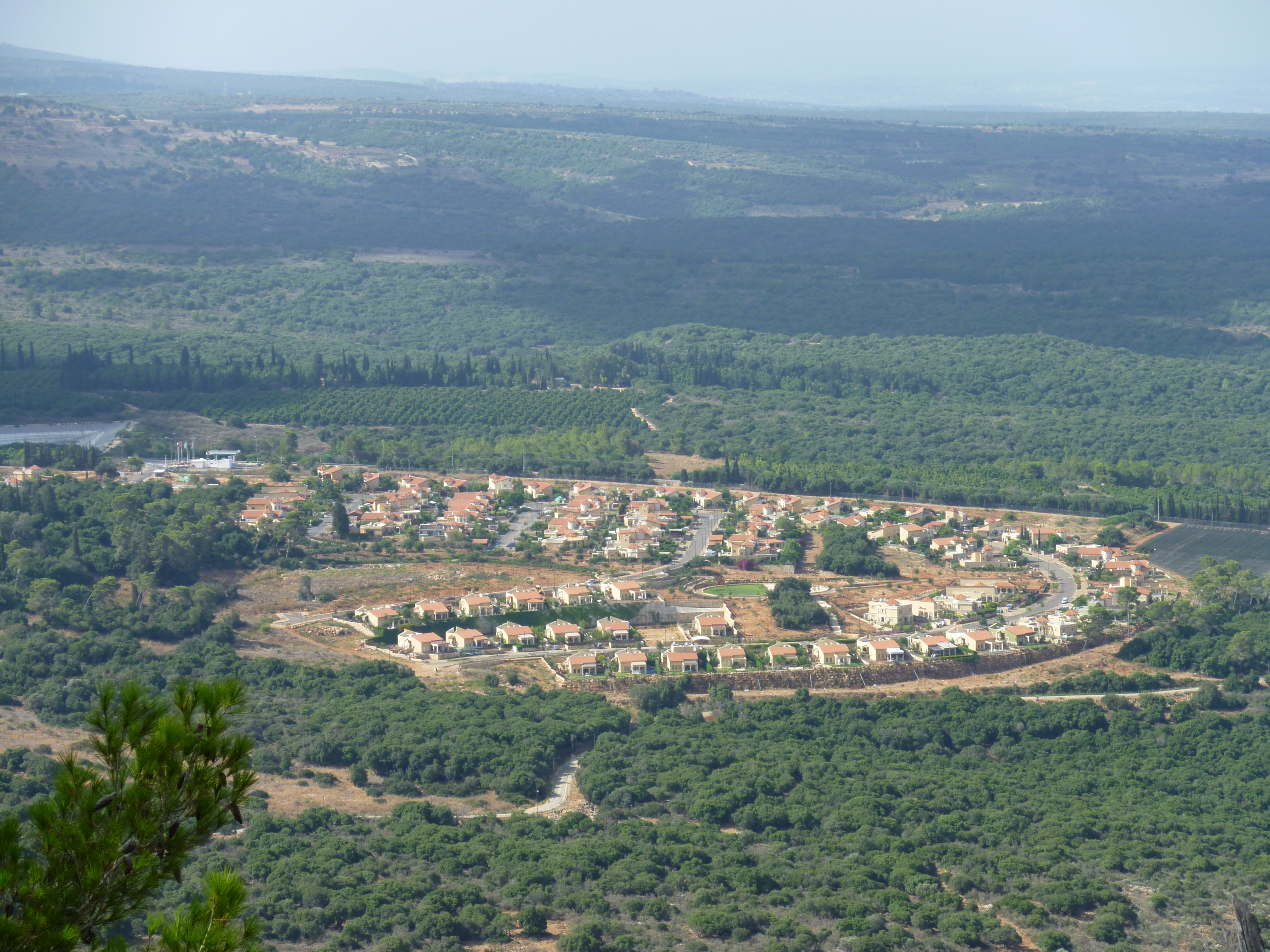 קיבוץ אילון, צילום מרכס אדמית